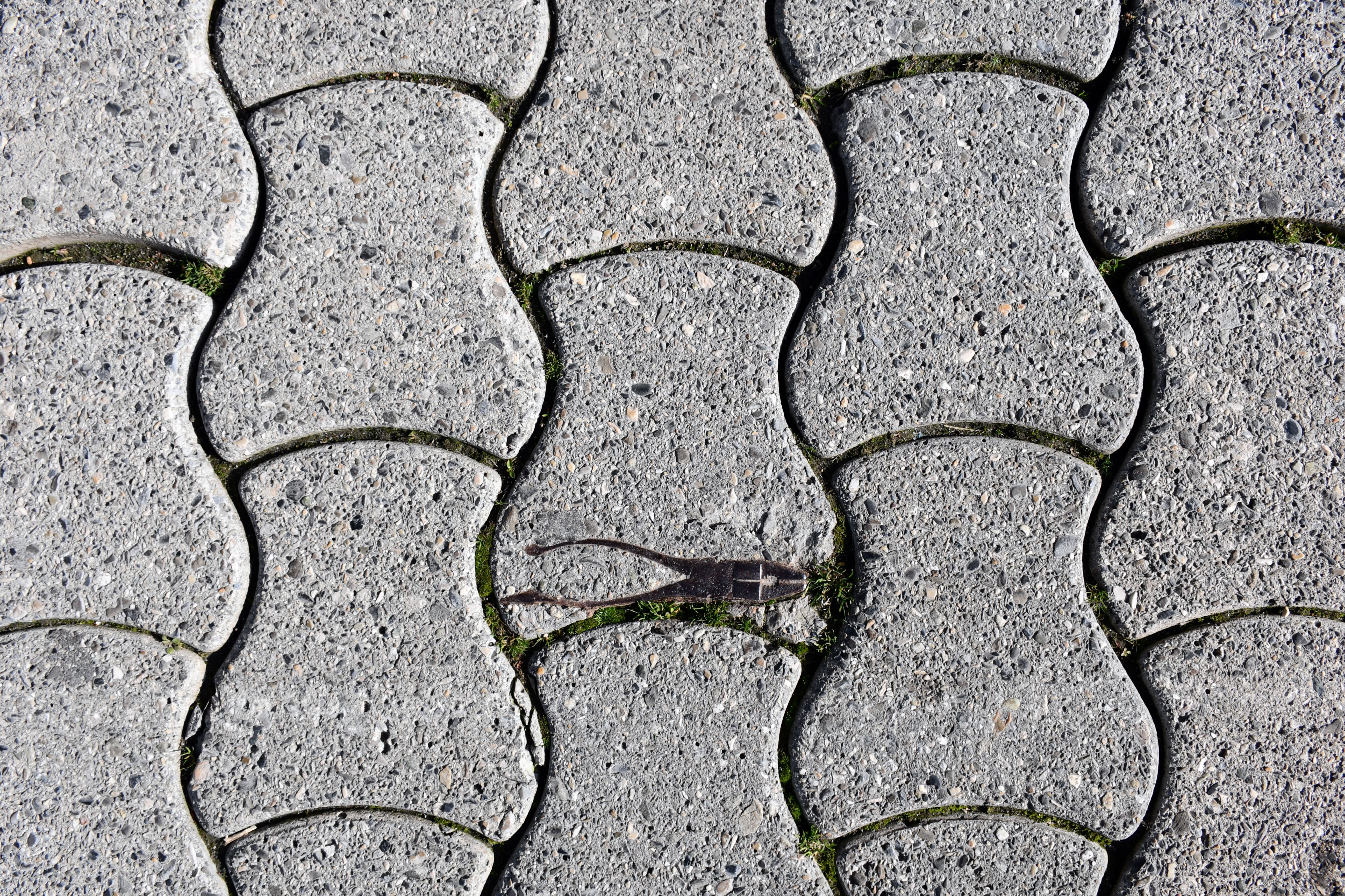 Le mystère de la pince coulée dans un pavé de la place de la Riponne, à Lausanne (Suisse).